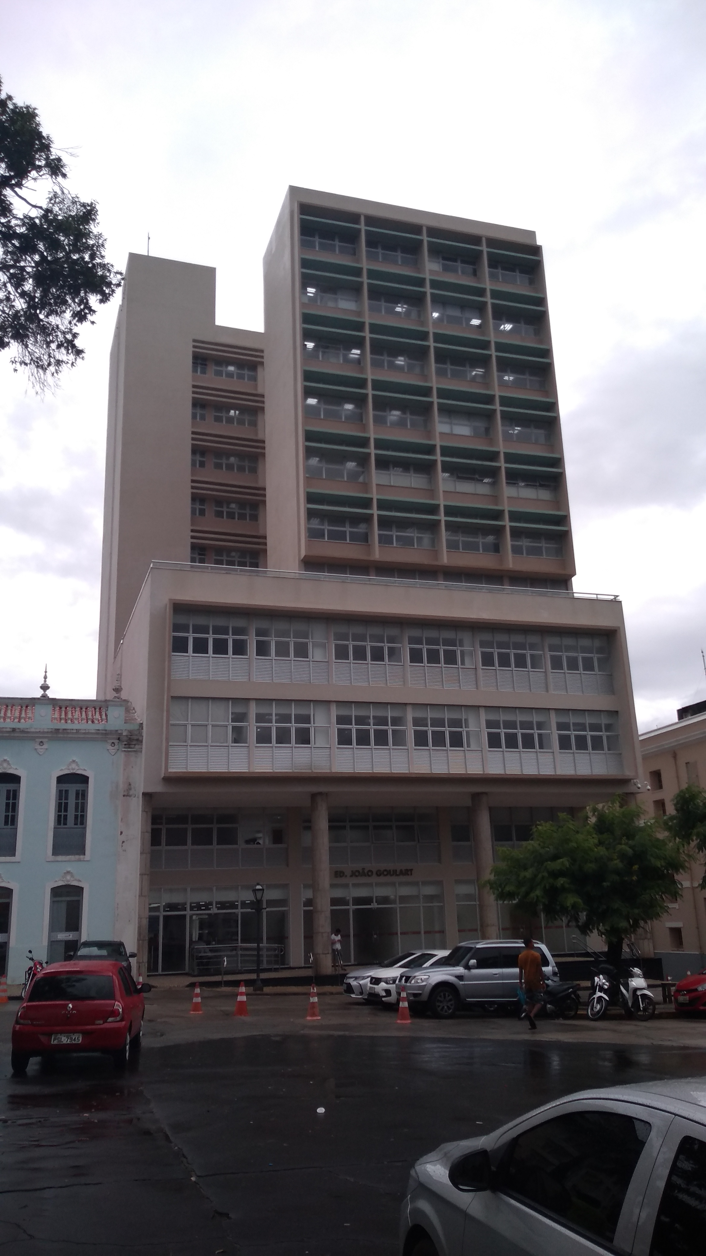 Edifício João Goulart, localizado em São Luís, MA - Brasil